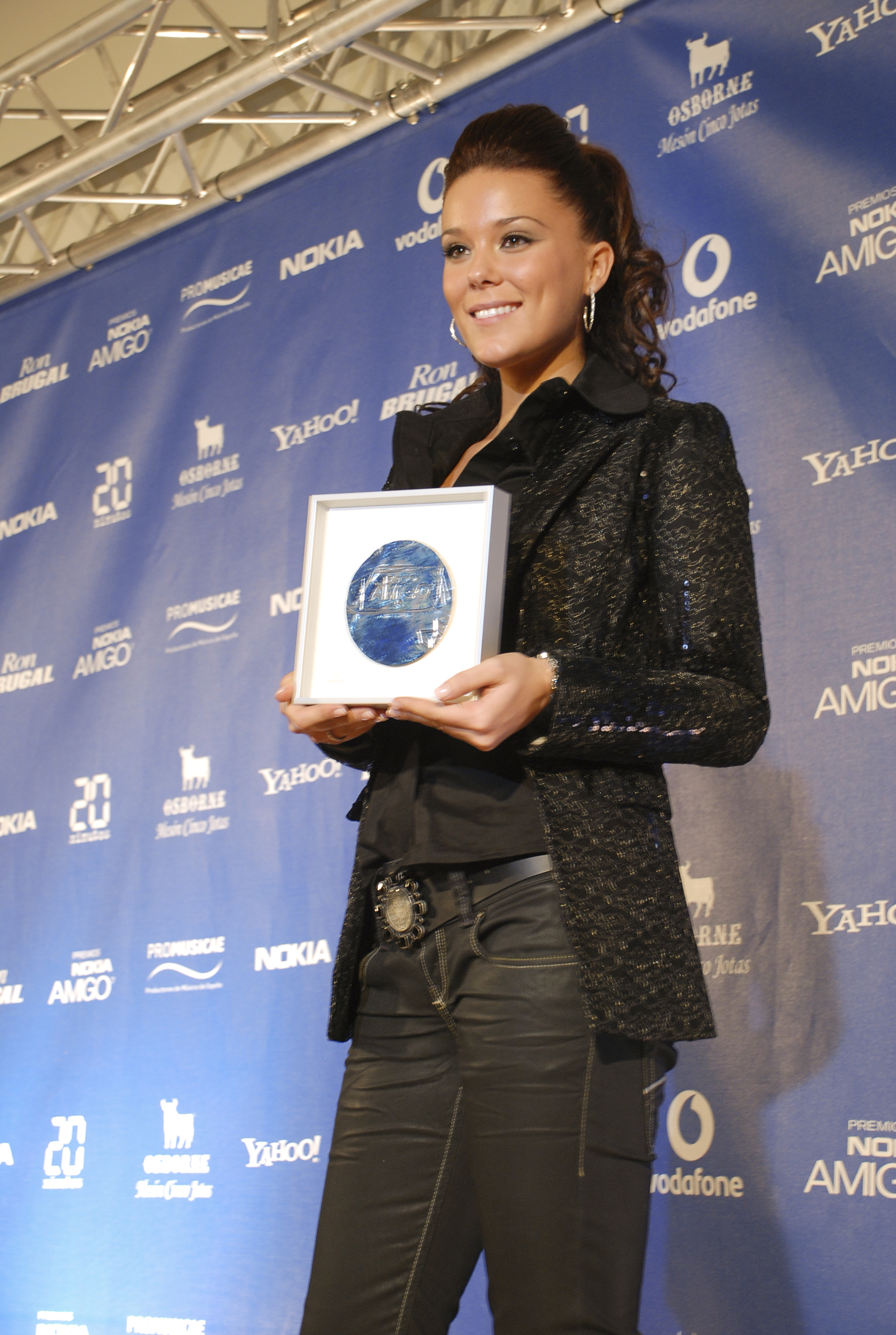 Premios Nokia Amigo 2007, El Informador Digital.